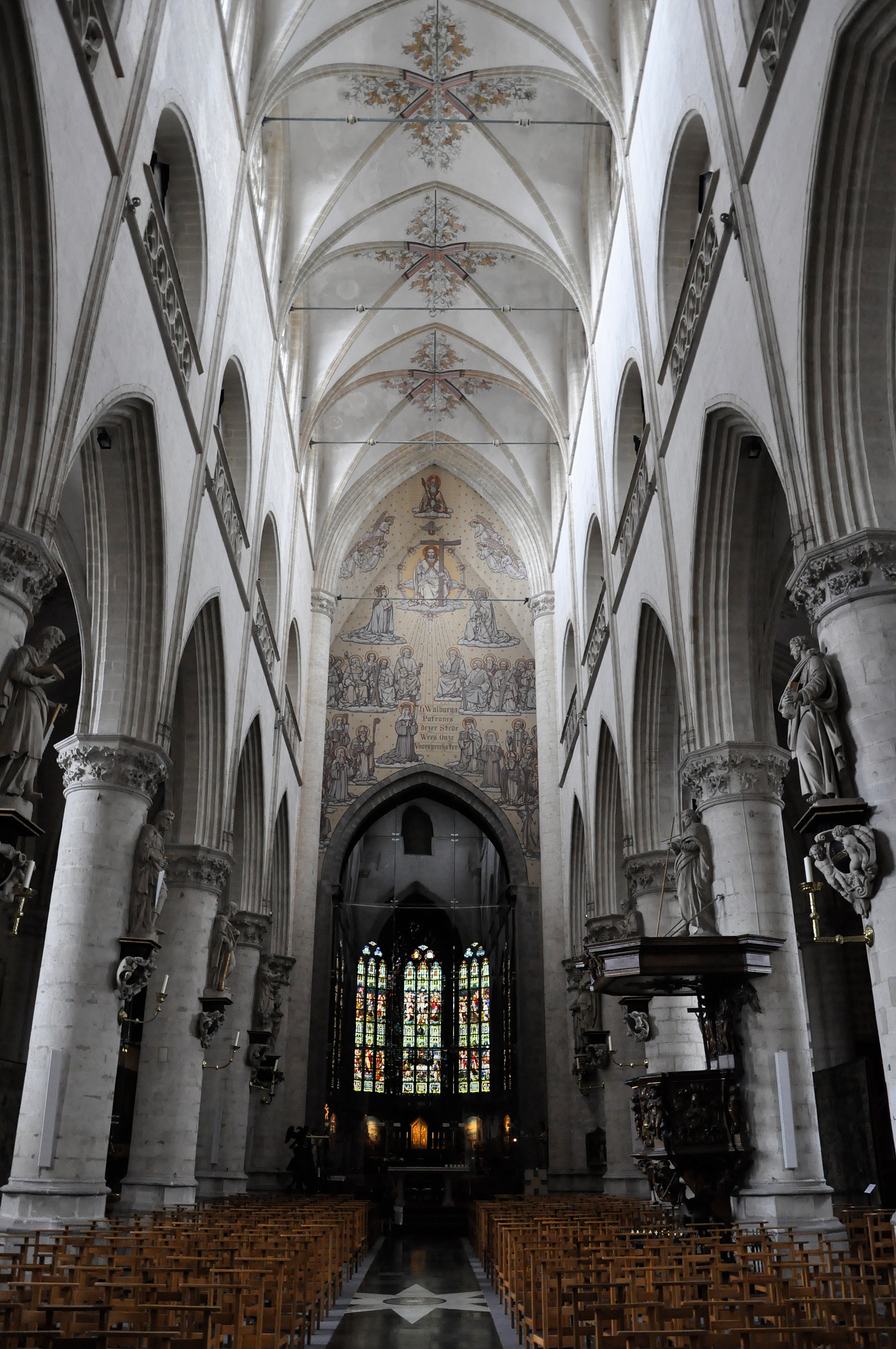 de Sint-Walburgakerk te Oudenaarde, België